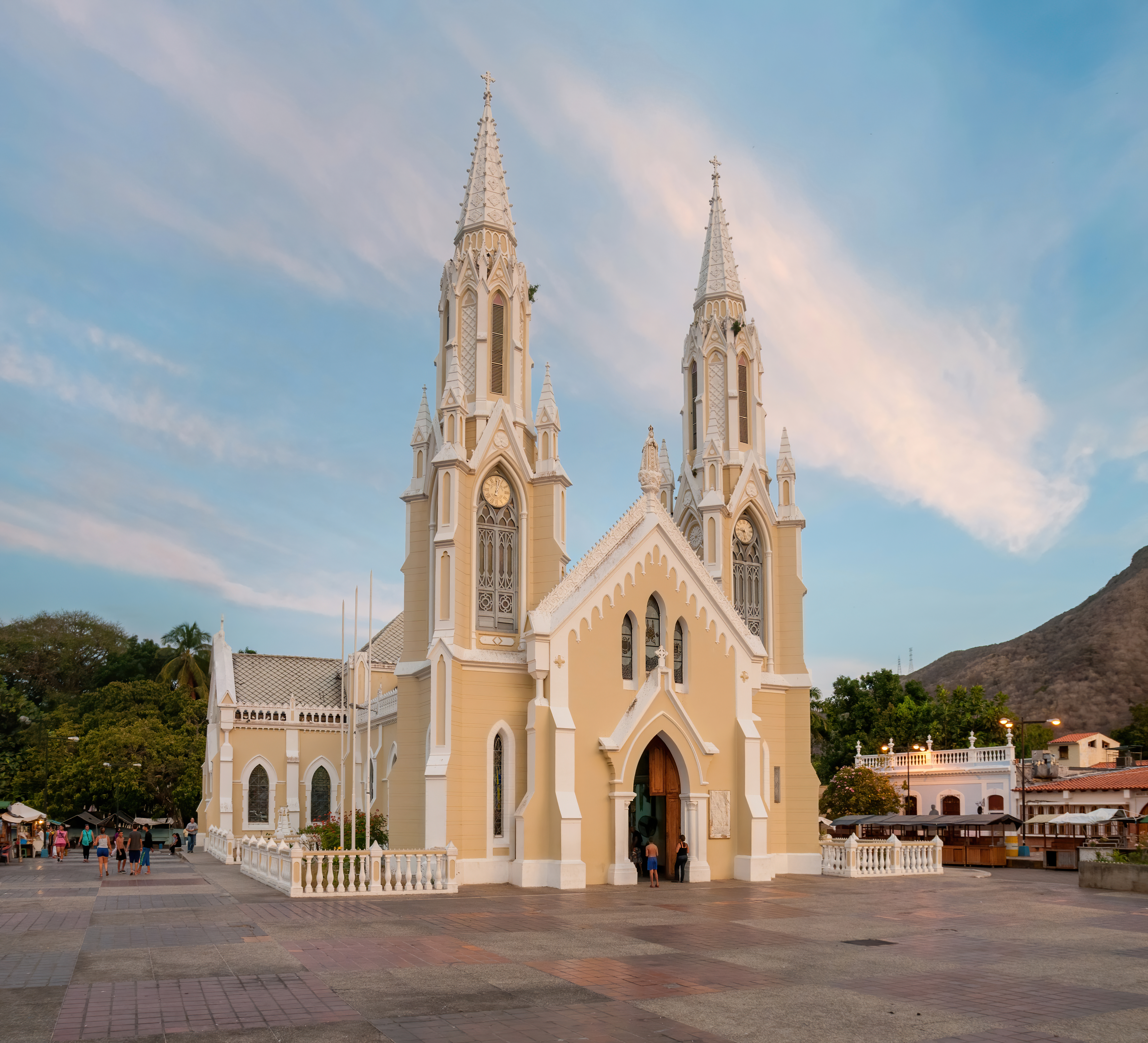 Basílica Menor de Nuestra Señora del Valle, Isla Margarita